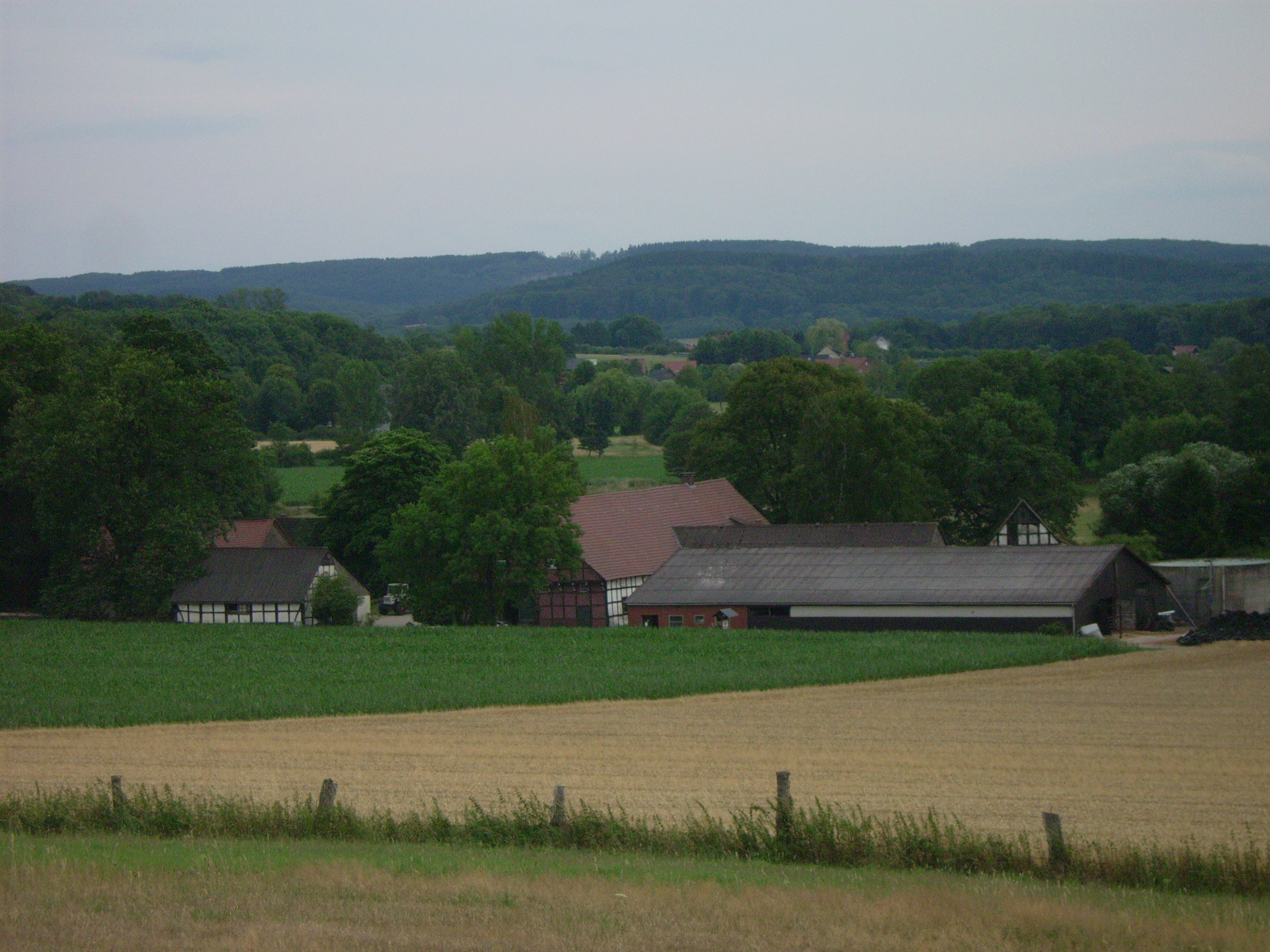 Blick vom Roten Berg in Hasbergen nach Süden